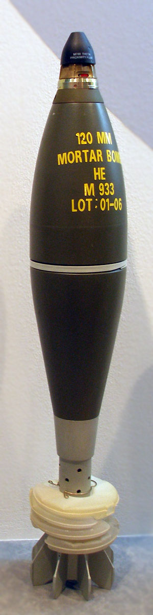 120mm mortar bomb HE